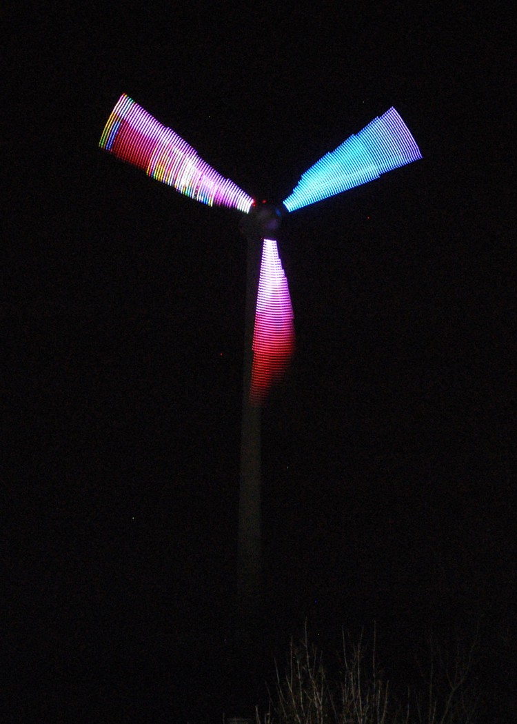 Der "Stern des Südens" in Kurzzeitaufnahme, alle 3 Rotorblätter erkennbar